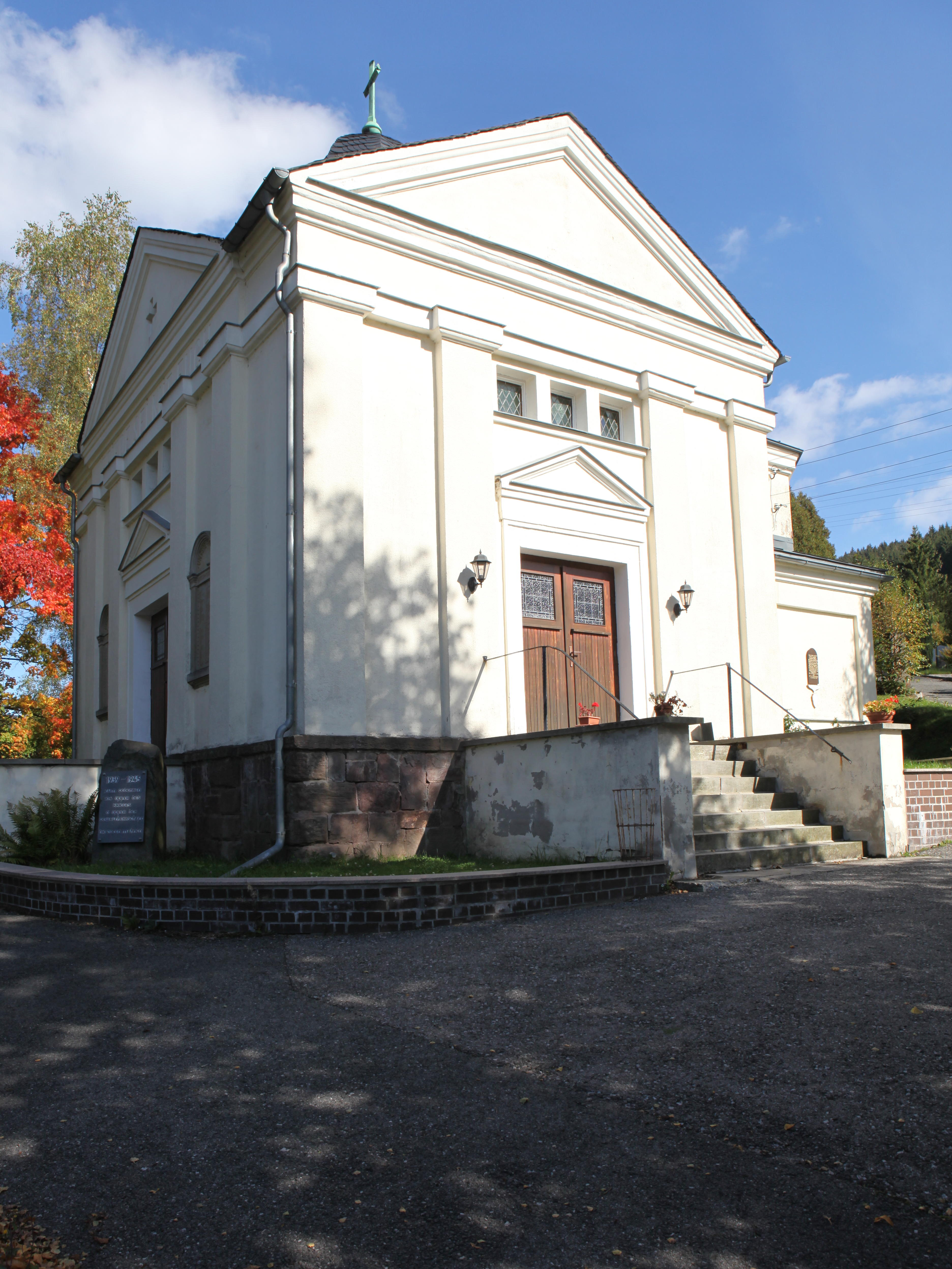 Friedhofskapelle in Haselbach, OT von Oberland am Rennsteig, Landkreis Sonneberg